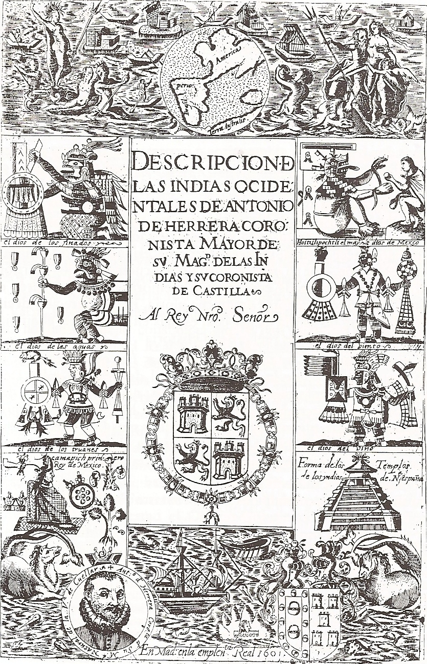 Portada de la "Descripción de las Indias Occidentales", de Antonio de Herrera y Tordesillas, 1601. Contiene el único retrato que existe del cronista.